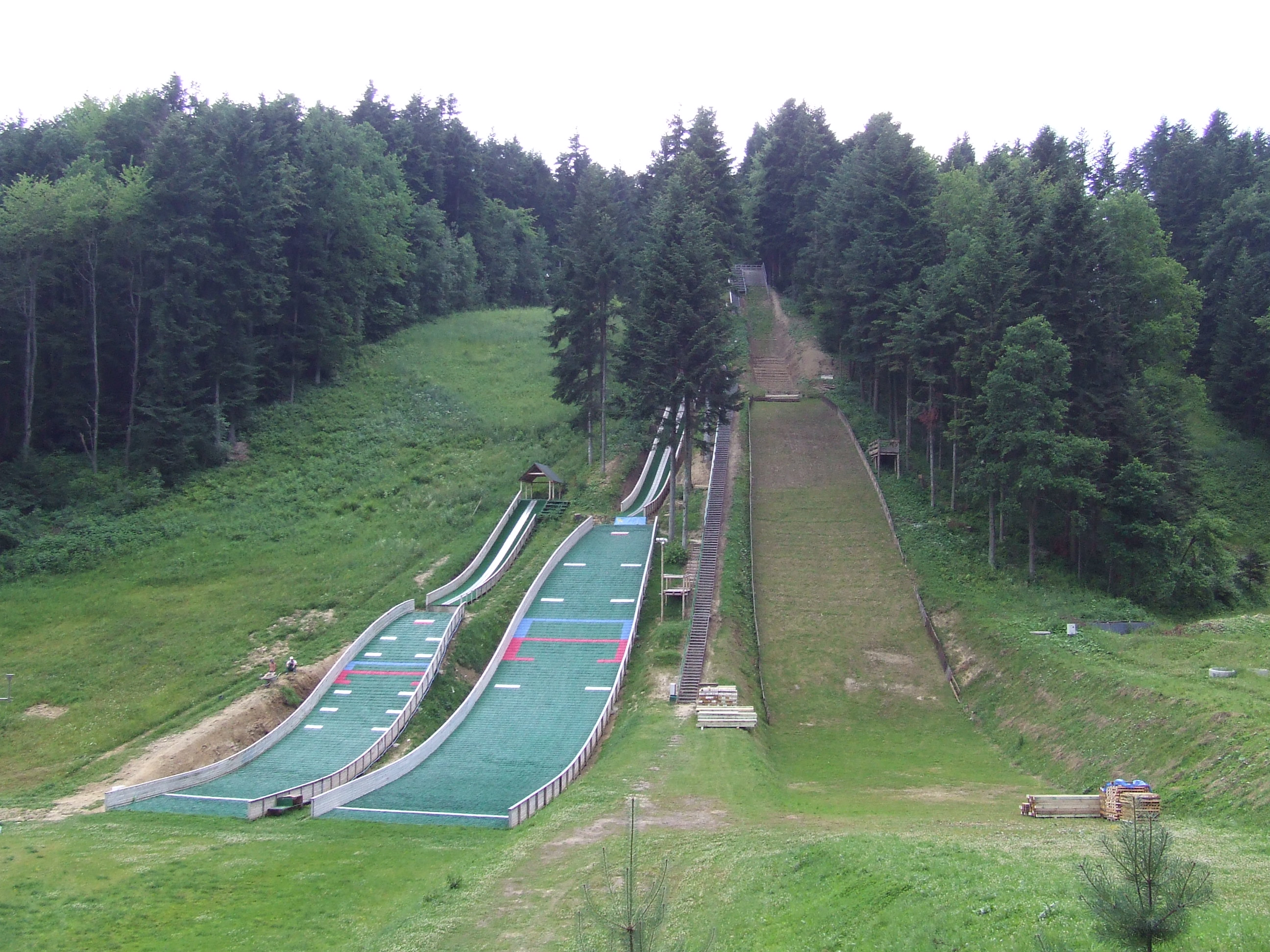 Ski jumps "Zakucie" - Zagórz, Poland